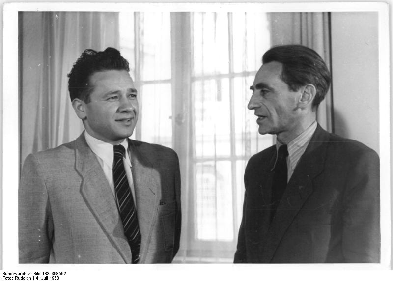 Illus-Rudolph 4.7.50 Deutscher Schriftsteller-Kongreß in Berlin. Vom 4.-6.7.50 findet in Berlin anläßlich des 5-jährigen Bestehens des Kulturbundes zur demokratischen Erneuerung Deutschlands ein deutscher Schriftsteller-Kongreß statt. UBz: Borowski (Polen) links, im Gespräch mit seinem Kollegen Jastrun (Polen). 7100-50